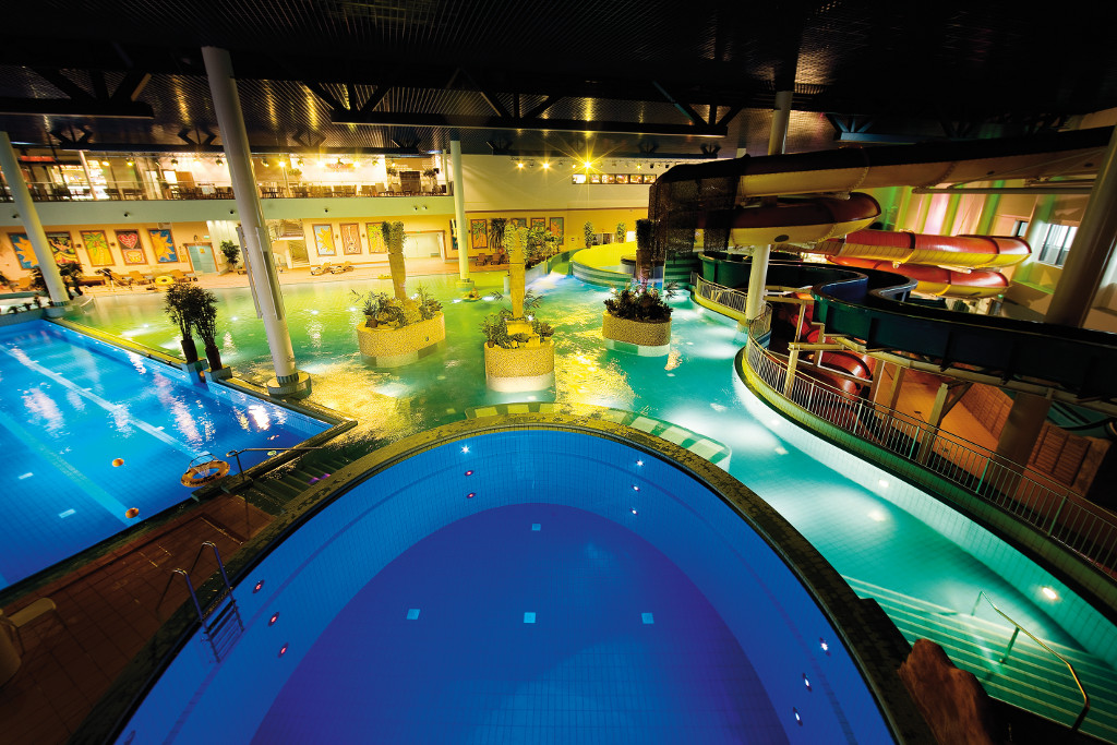 Flamingo Spa vesipuiston yleisnäkymä.